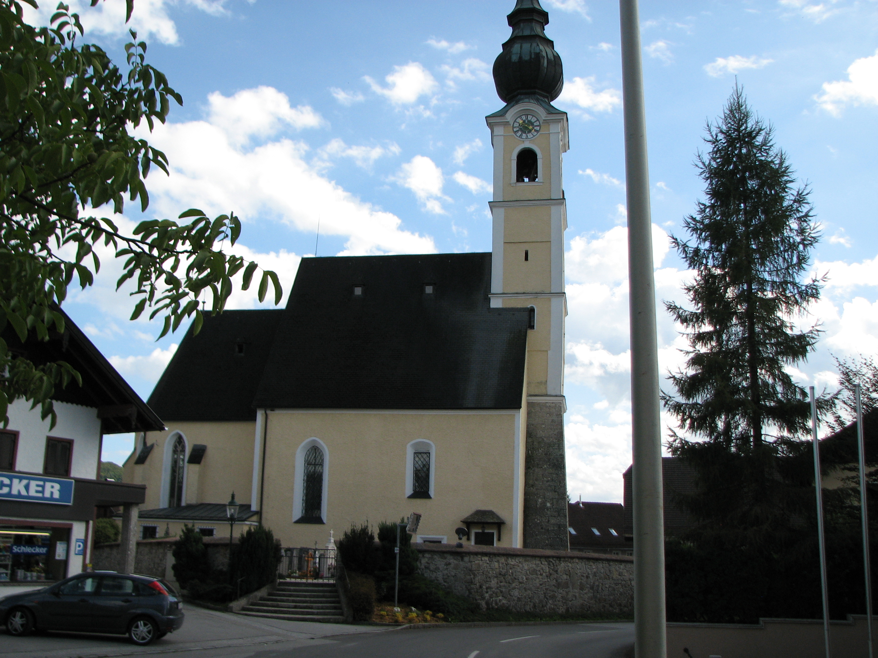 Kath. Pfarrkirche Mariae Himmelfahrt